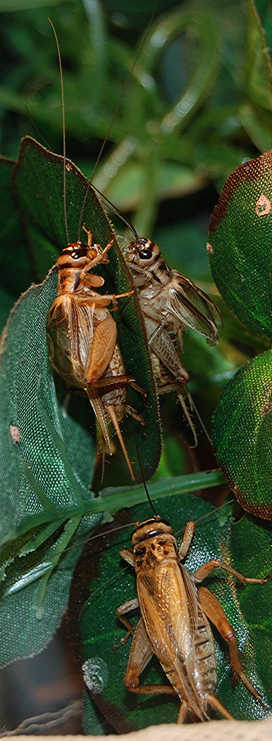 Acheta domesticus